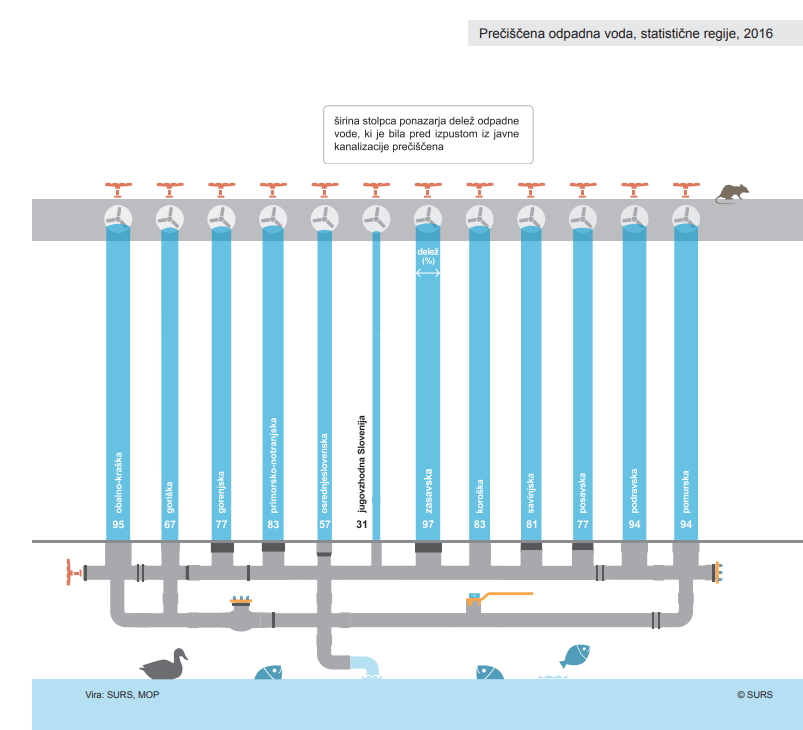 Prečiščena odpadna voda, statistične regije, 2016